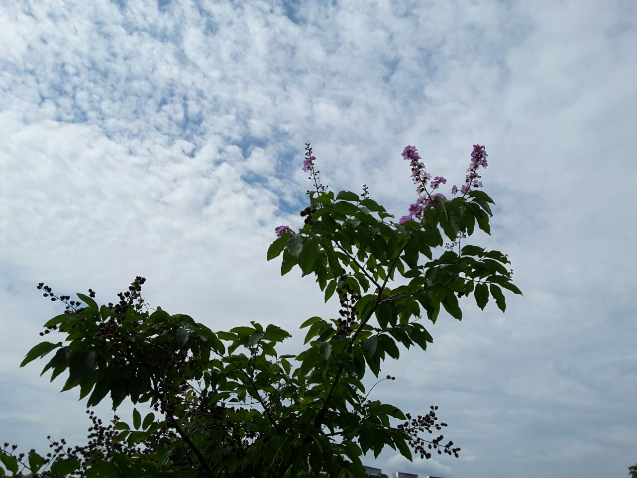 Paulownia tomentosa